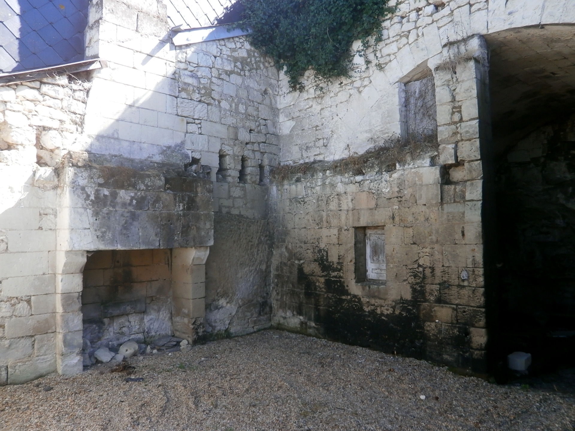 Ancienne habitation troglodytique (Candes-Saint-Martin)